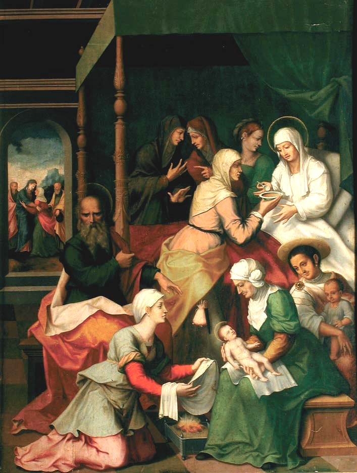 La obra representa el nacimiento del profeta San Juan Bautista, precursor del Mesías.